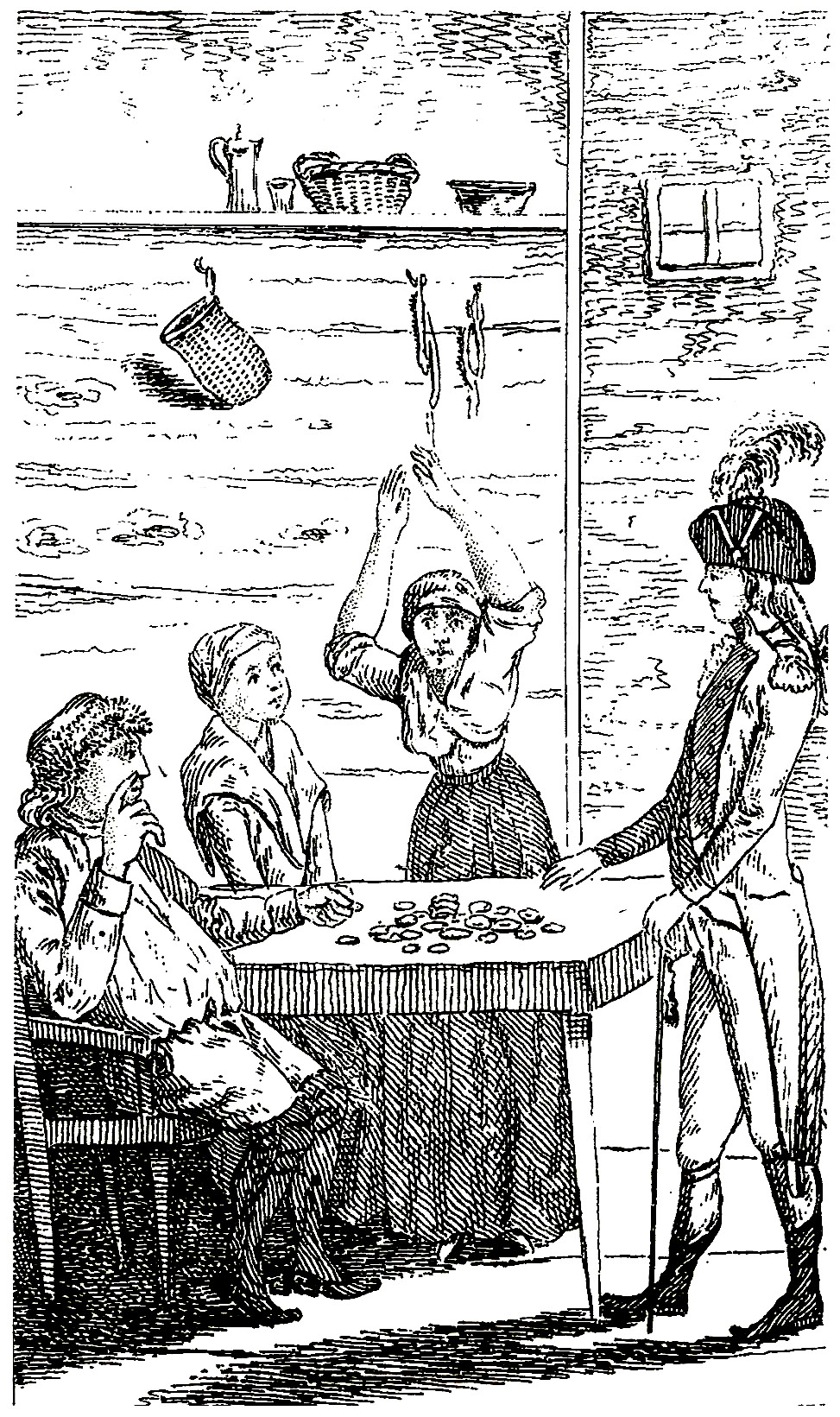 Steuereintreibung bei der Landbevölkerung durch Soldaten während der Helvetischen Republik, um 1800. Illustration in: Johann Georg Heinzmann: Kleine Schweizer-Chronik. Zweyter Teil. Enthält die Ereignisse 1700-1801 mit Einschluss der Revolutionsgeschichte Helvetiens. Bern 1801.